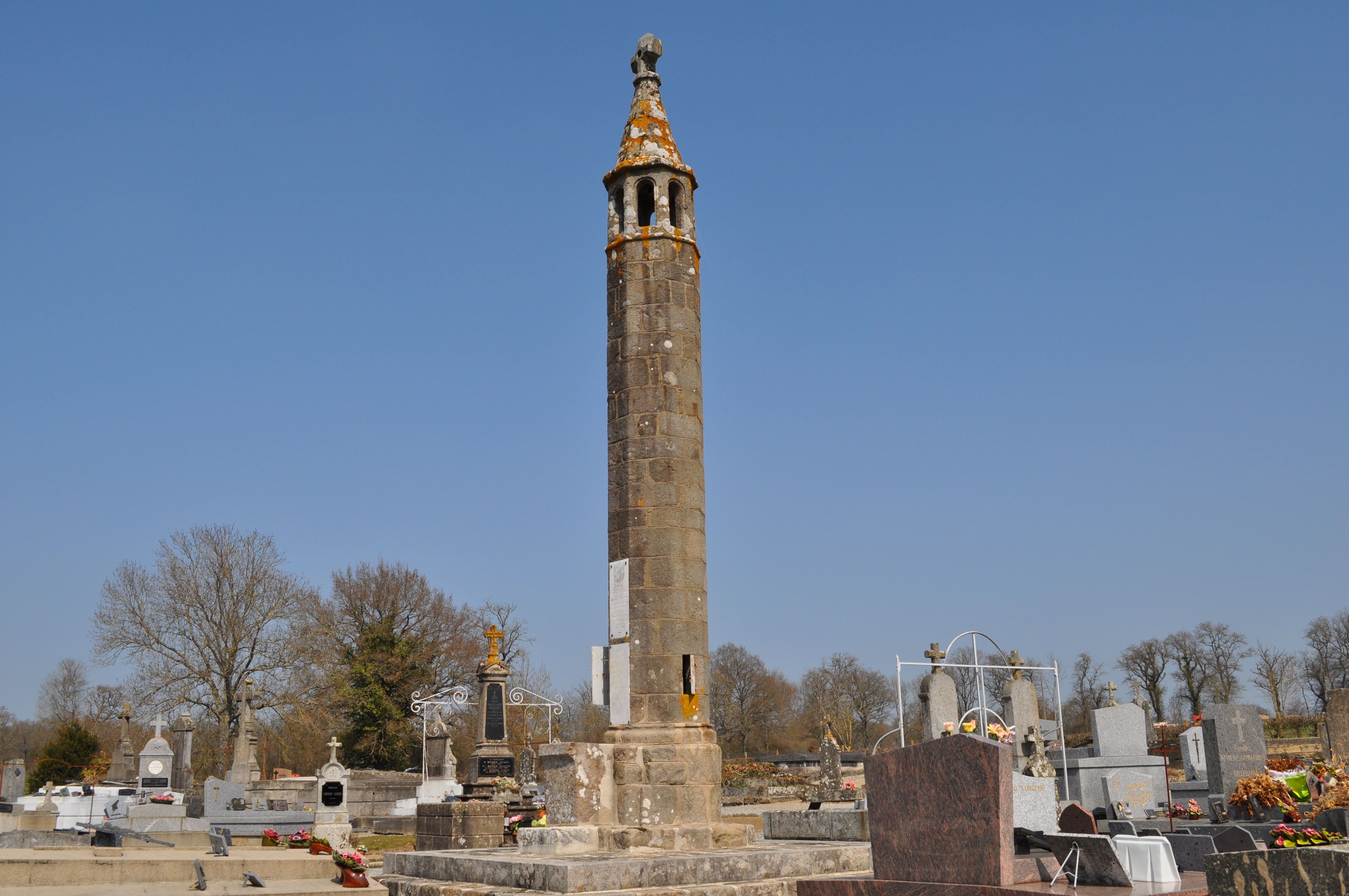 La lanterne des Morts d'Oradour-Saint-Genest